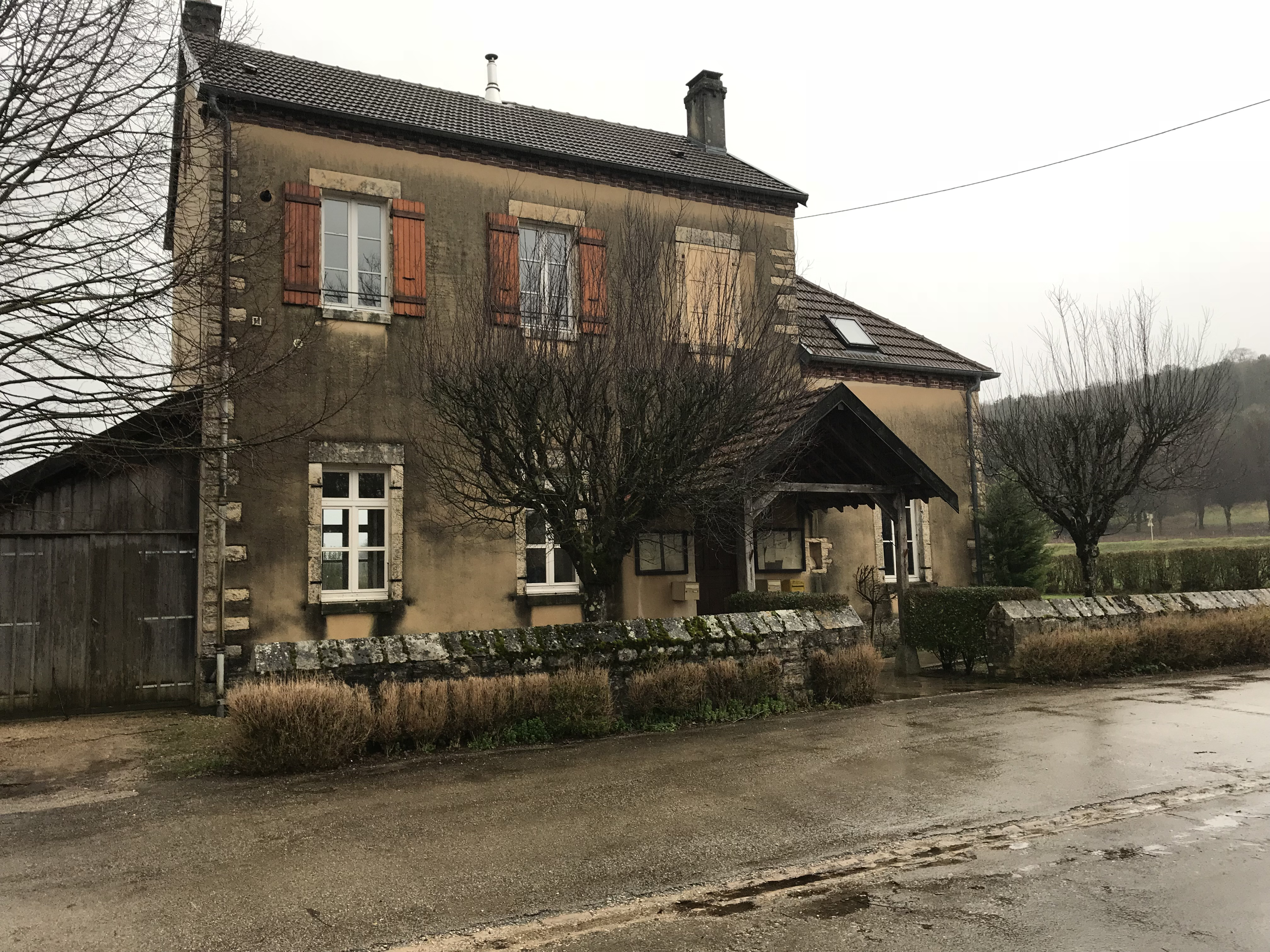 Grange-de-Vaivre (Jura) en janvier 2018.